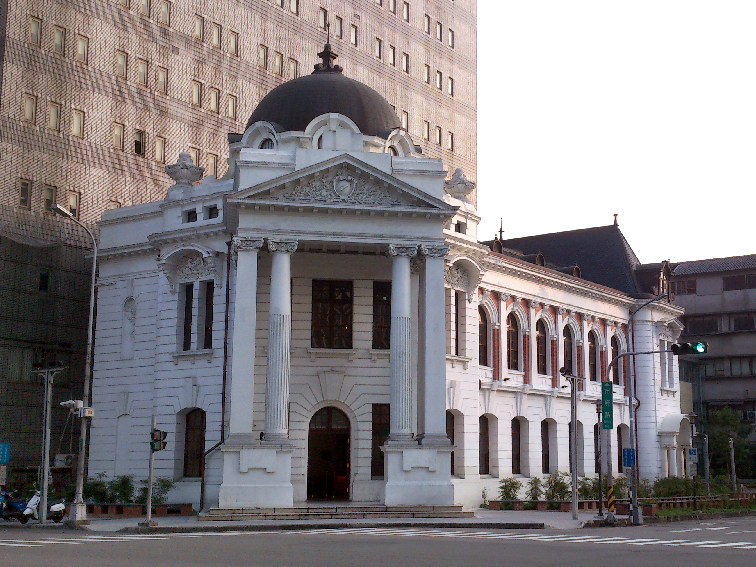 2016年10月的台中市役所